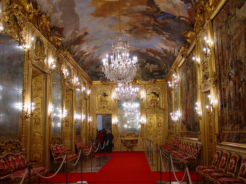 Palazzo Clerici a Milano - Galleria degli arazzi, con l'affresco del Tiepolo (1741).